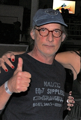 Arnaldo Saccomanni , jurado do SBT